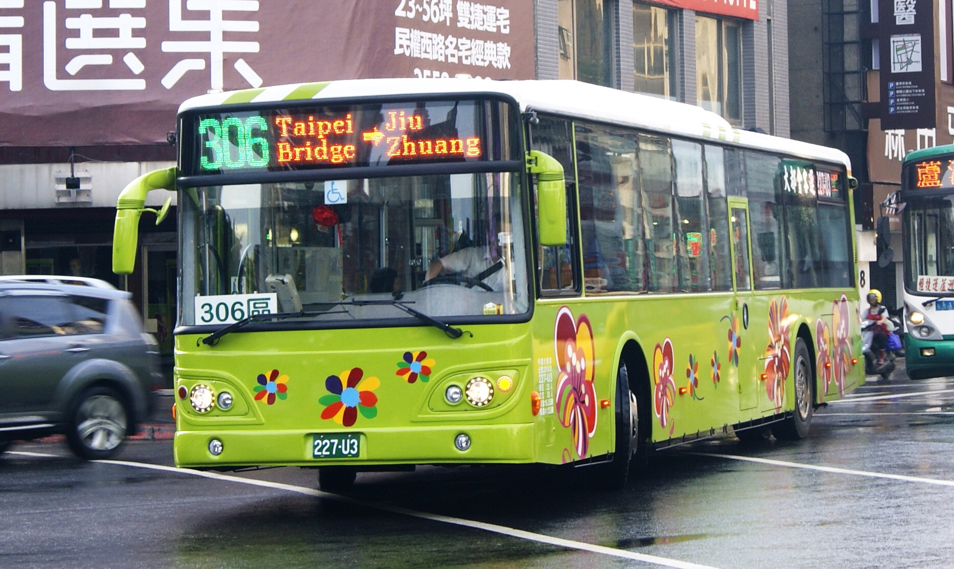 大都會客運 227-U3 306區間車 2014 DAEWOO BS120CN